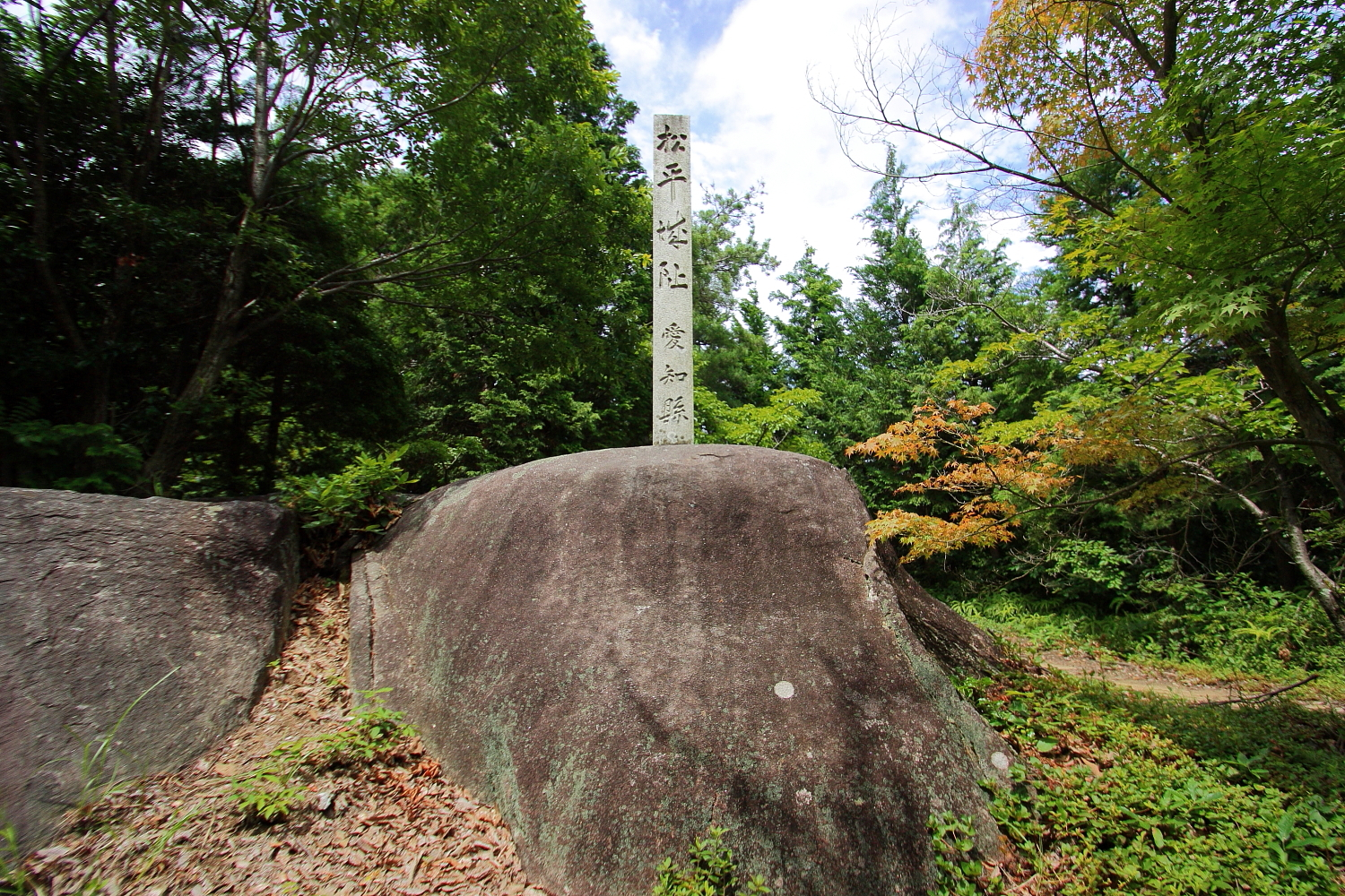 郷敷城山頂（豊田市松平町、2009年）